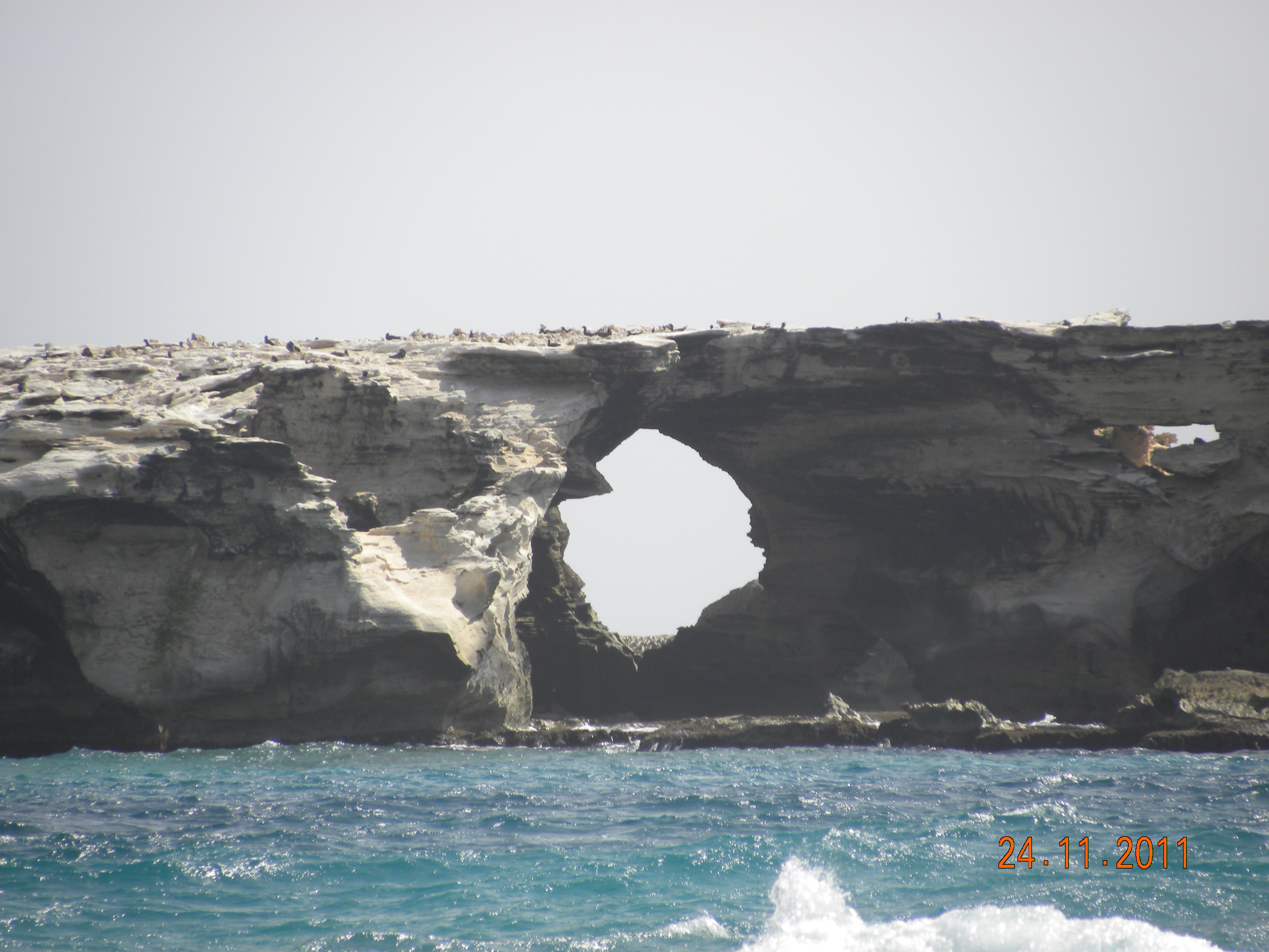 Boa Vista. Isolotto a Curral Vehlo